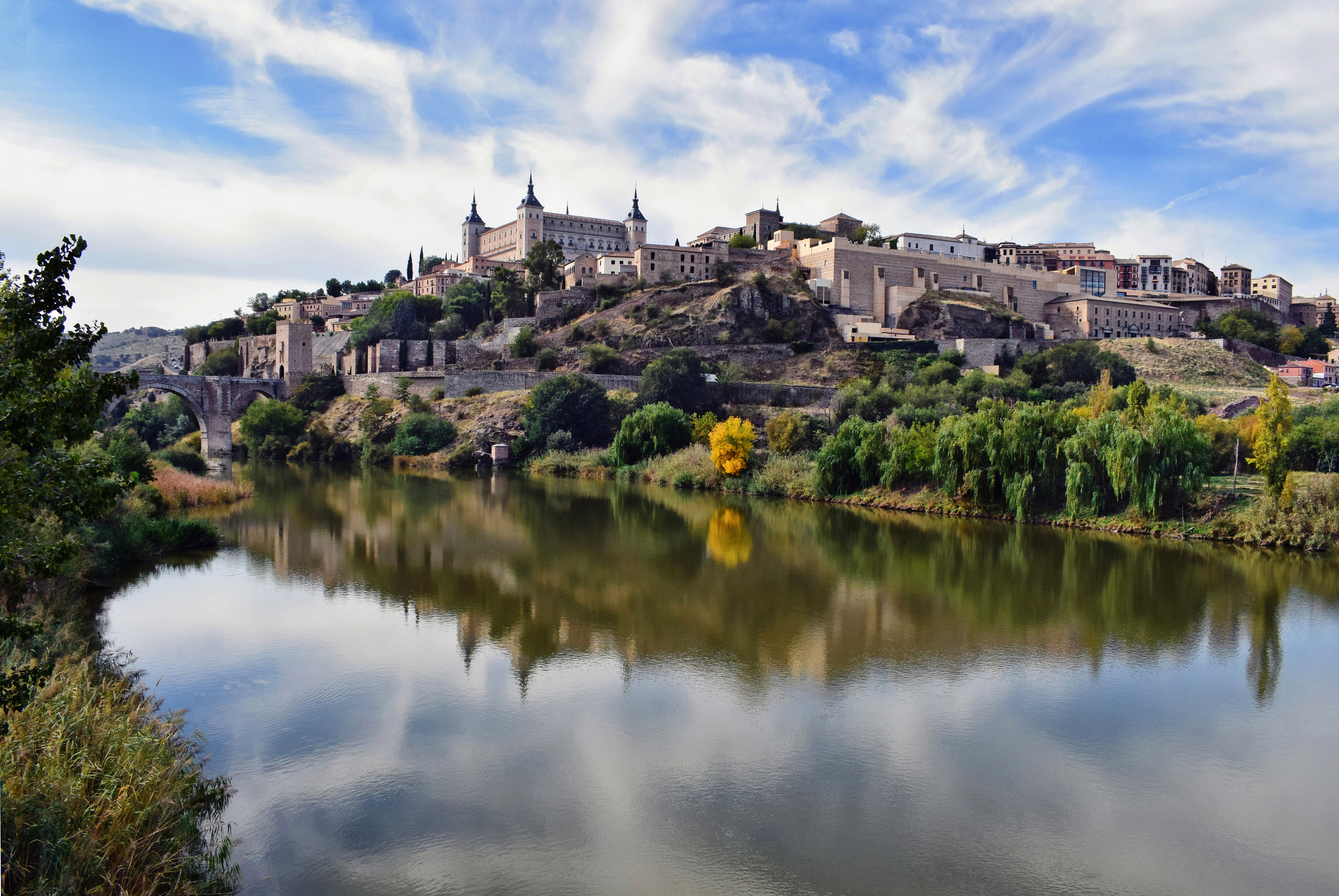 Vista de Toledo (España).